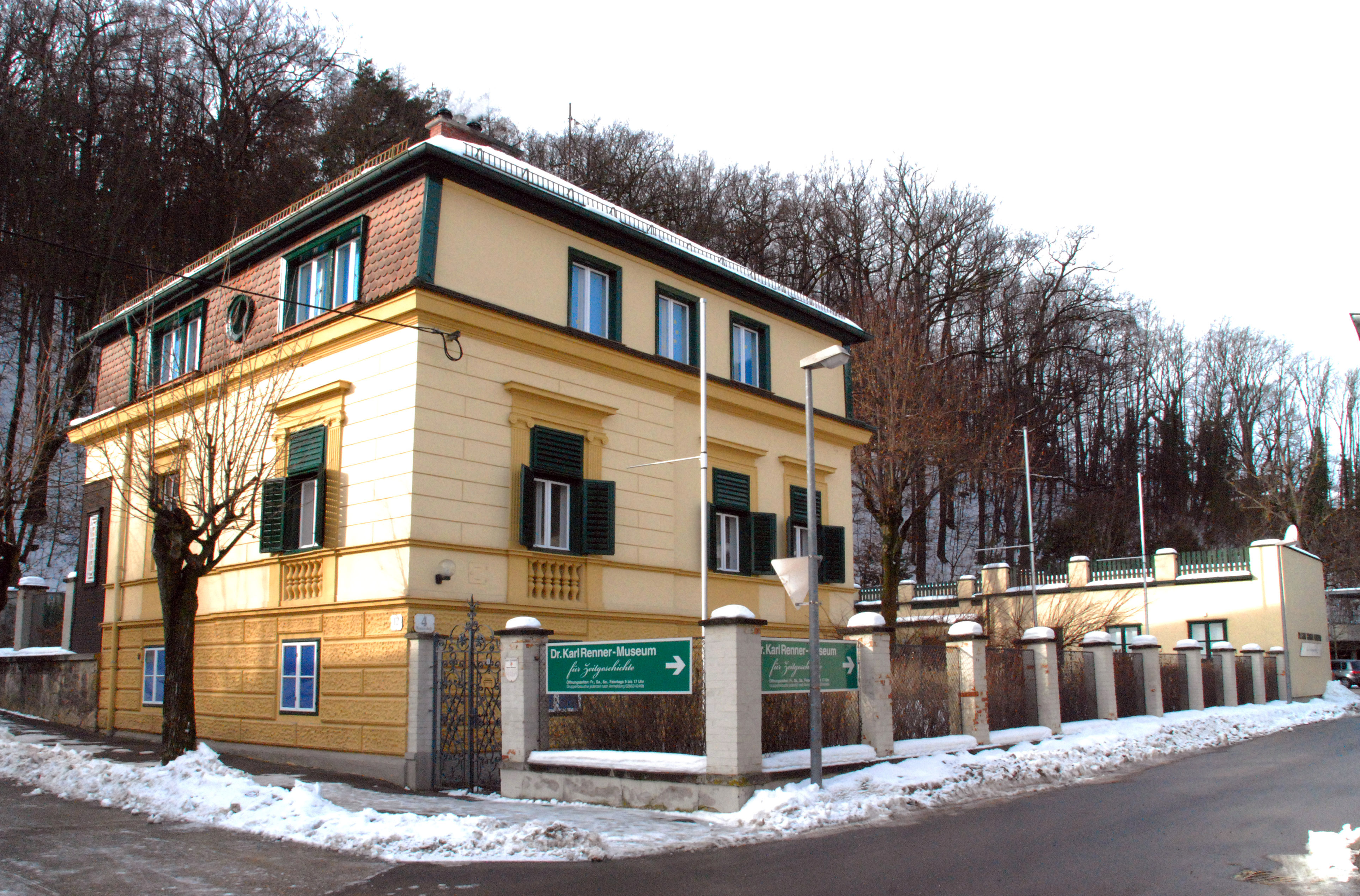 Rennervilla